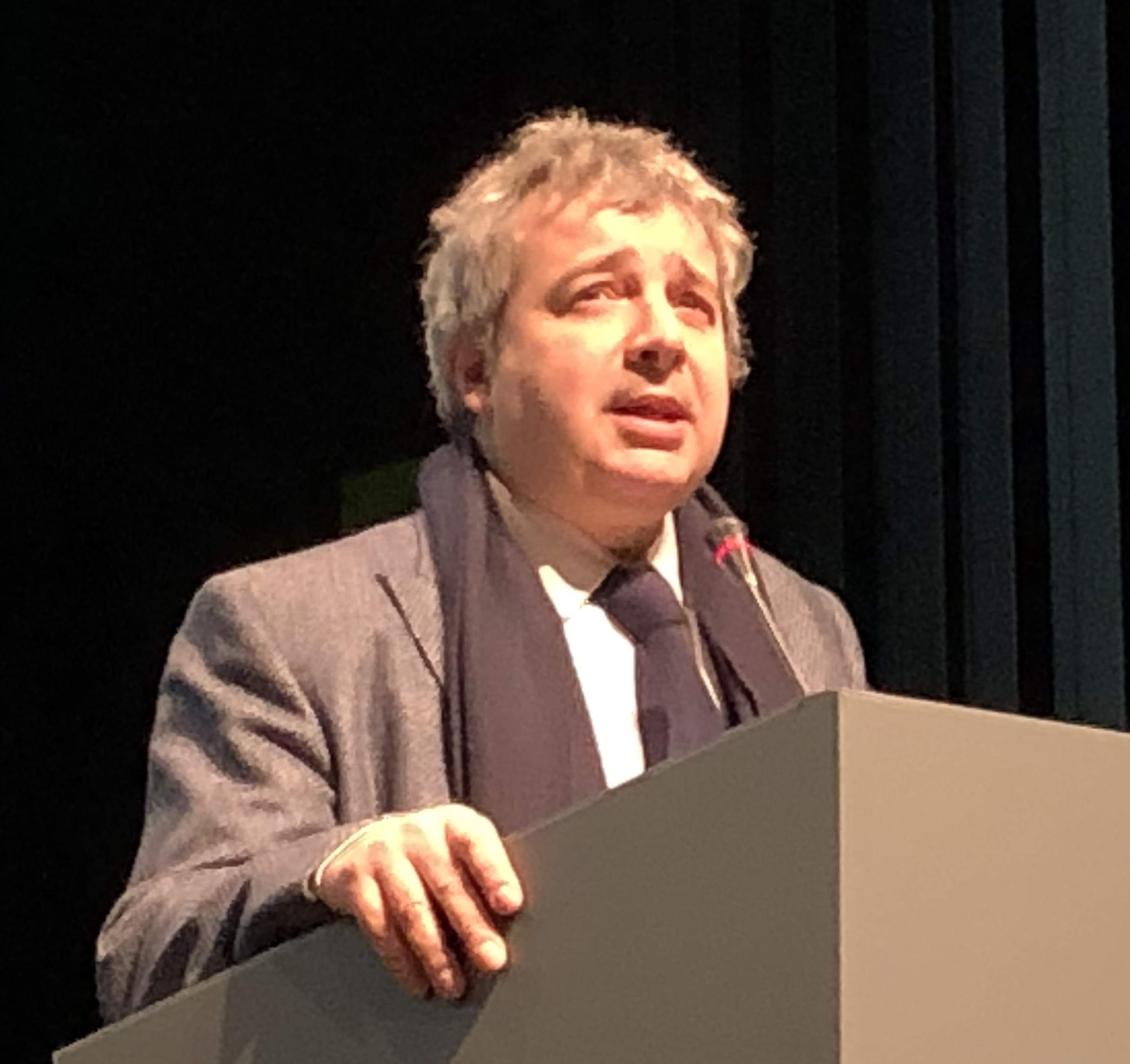 Inauguración del II Festival de Filosofía Malaga